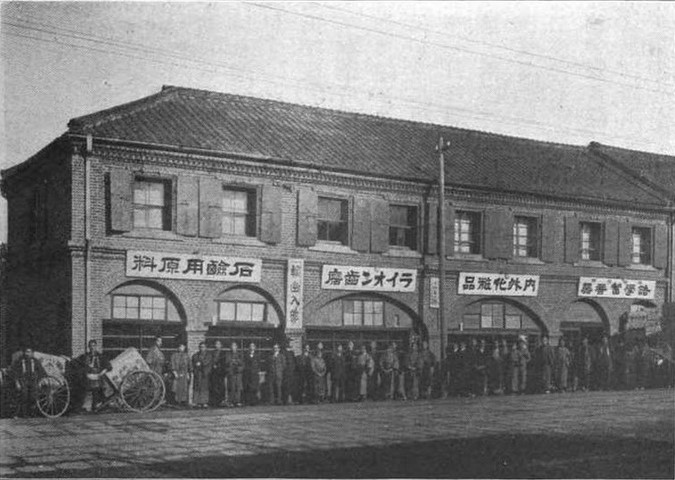 小林富次郎商店（のちライオン歯磨）